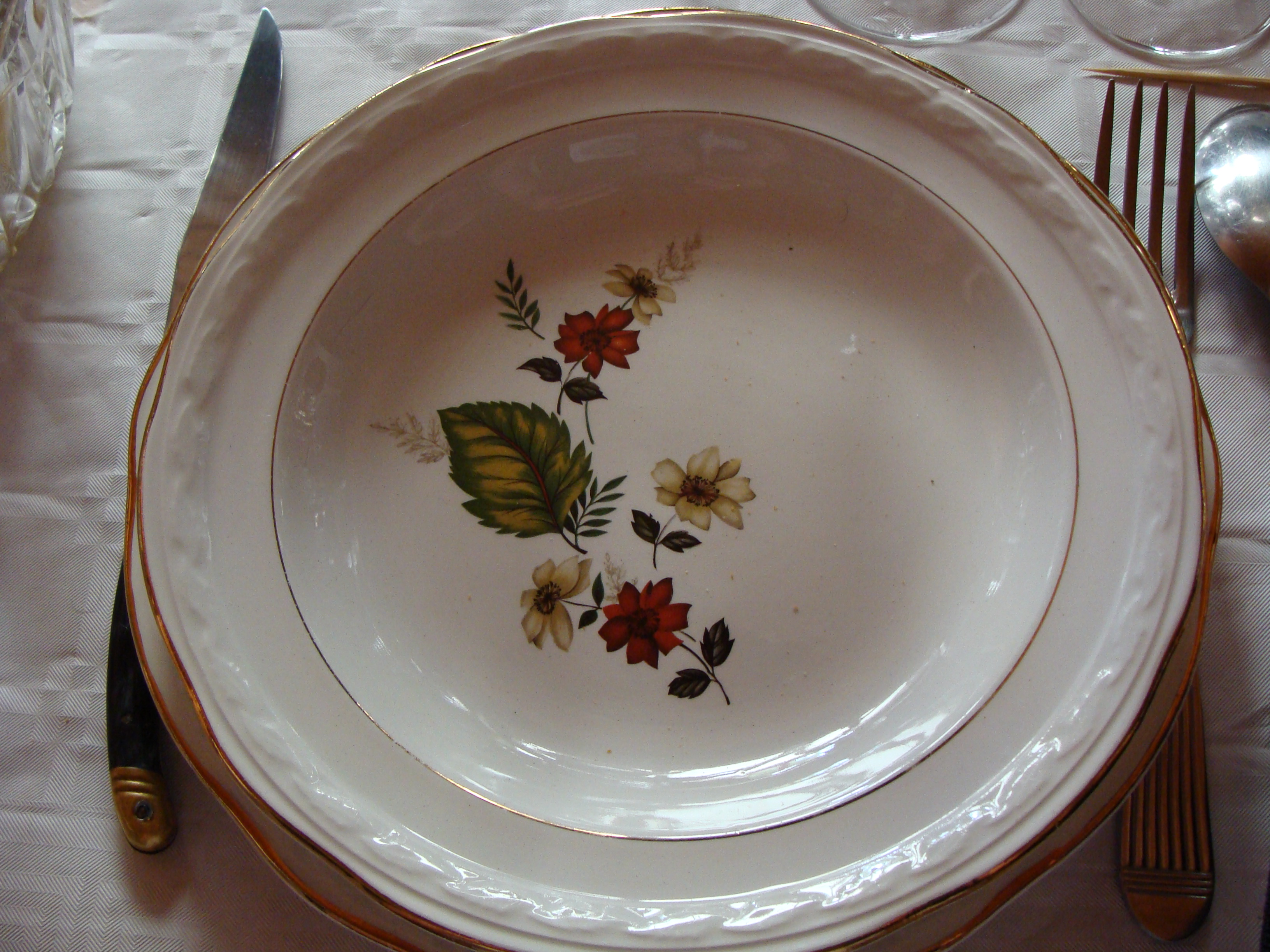 Assiette des manufactures de Faïence du Moulin des loups à Orchies